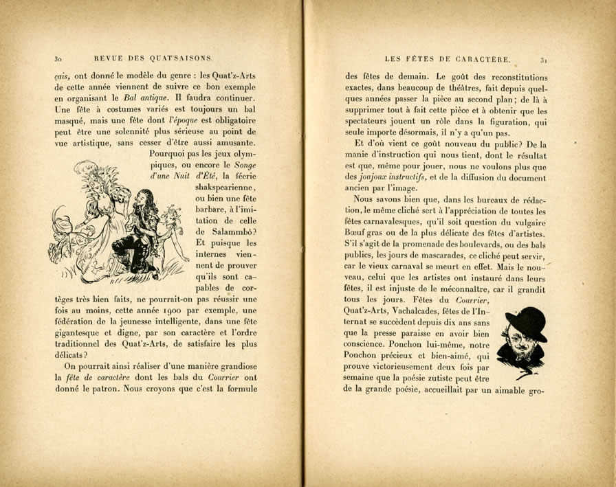 2 pages qui parlent du bal des Quat'z'Arts et d'autres fêtes.